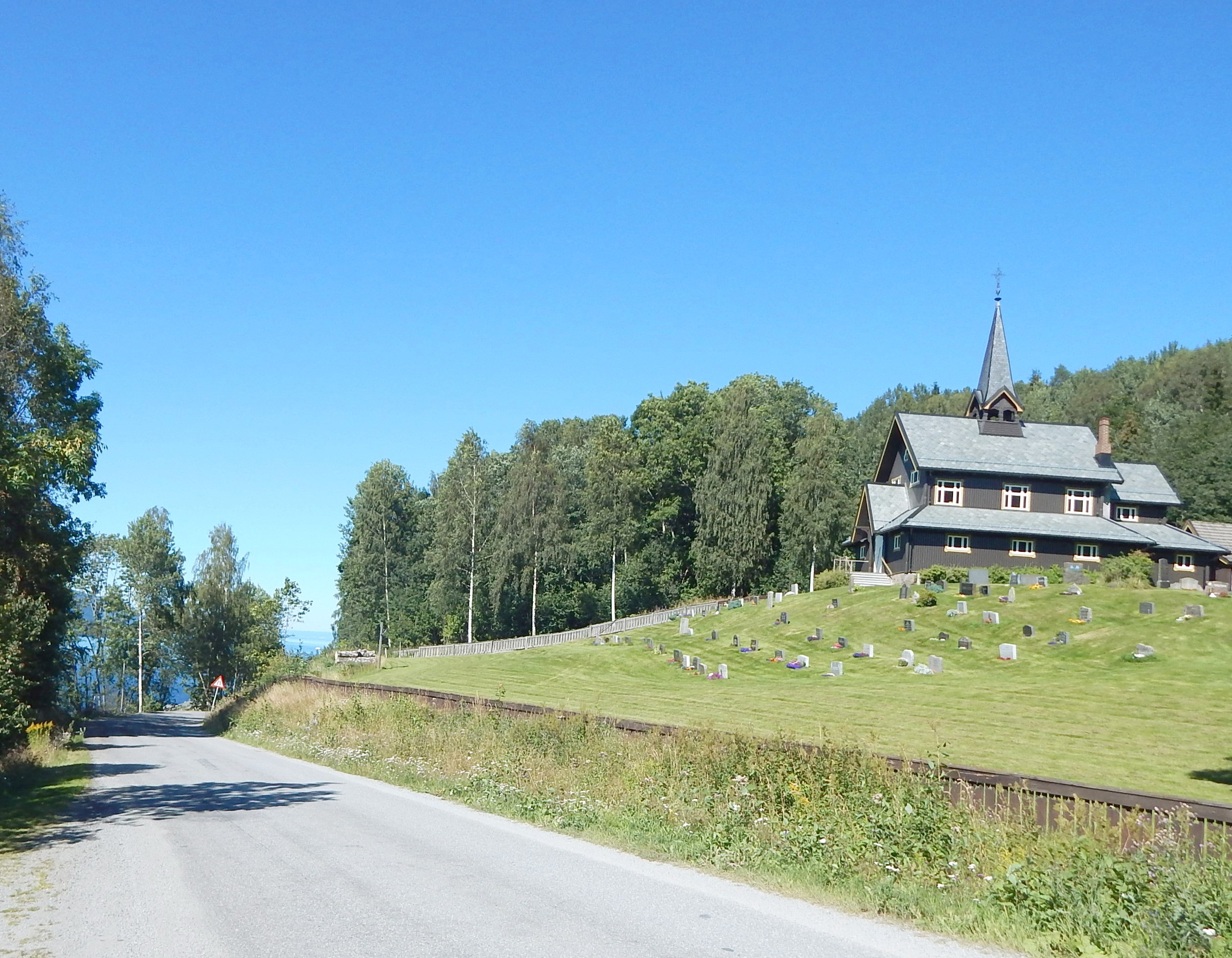 Fylkesvei 1896 (tidl. 228) ved Strandlykkja kapell